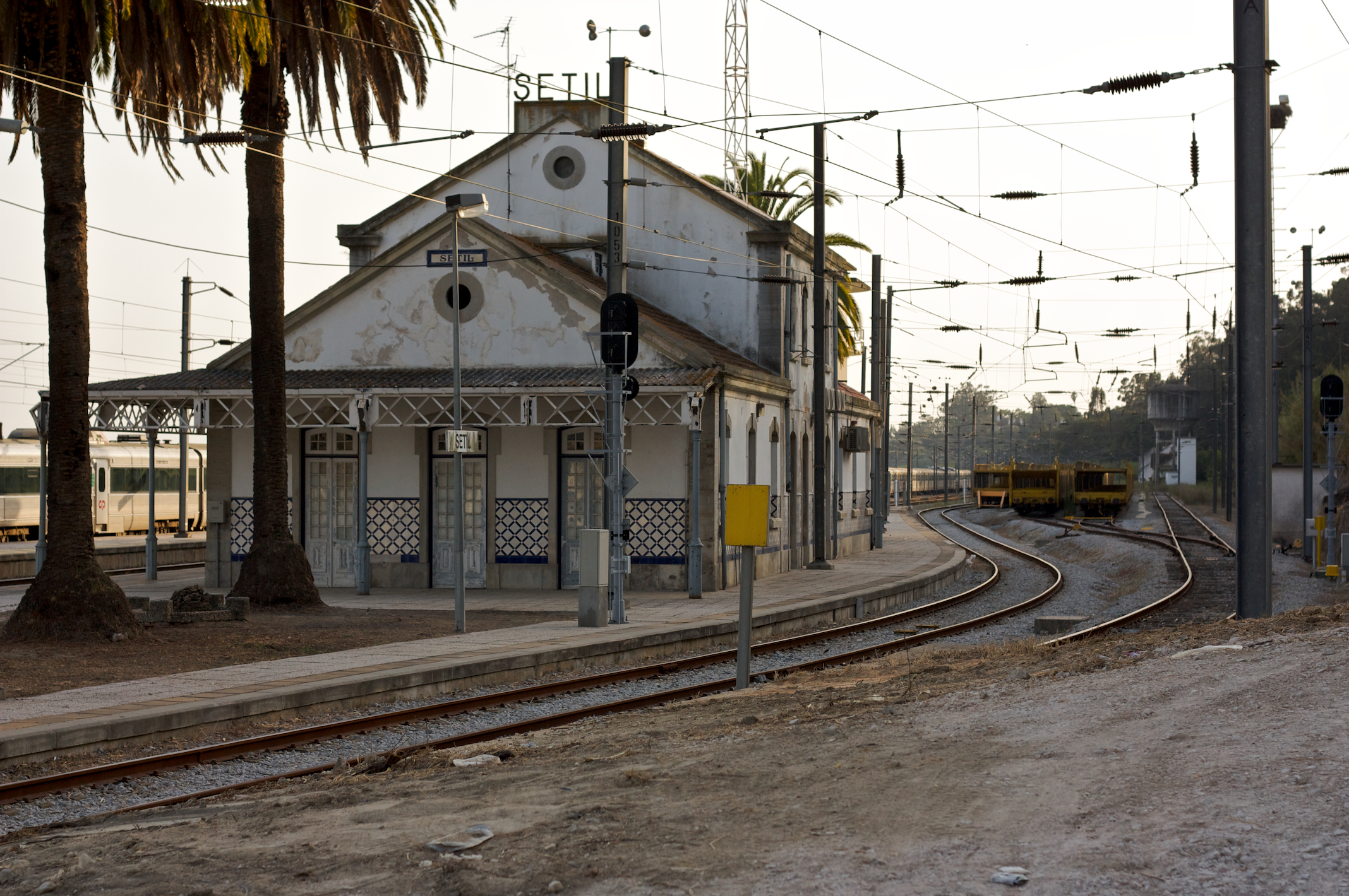 Tipo: ES [Estação Satélite] Local: Setil [Linha do Norte, PK 56 • Linha de Vendas Novas, PK 0,0] Data e hora: 8 de Setembro de 2009 [18h38]